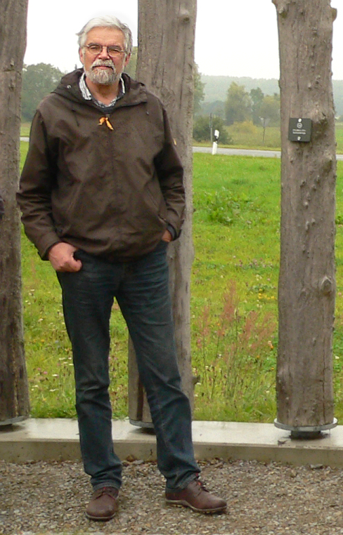 Jan Joost Assendorp an der Rekonstruktion des auf dem Hasenberg in Pevestorf entdeckten Pfostenkreises etwa 1,5 km südlich von Pevestorf an der Straße zwischen Restorf und Gartow